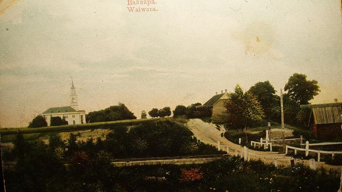 Vaivara kirik